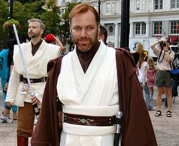 Obi-Wan Kenobi cropped